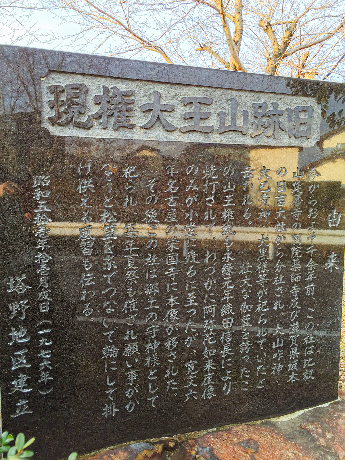 犬山市塔野地に遺される山王権現の跡地にある伝承の石碑です。